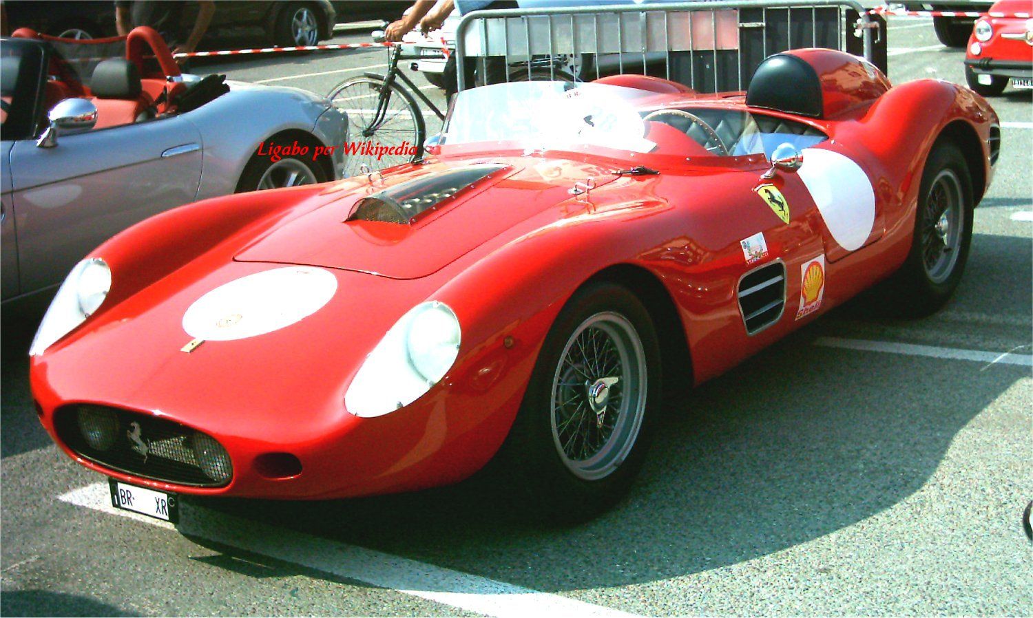 Ferrari 250 Testa Rossa replica su autotelaio "250 GT del 1957 fotografato al Raduno Auto Storiche di Medole nel 2007